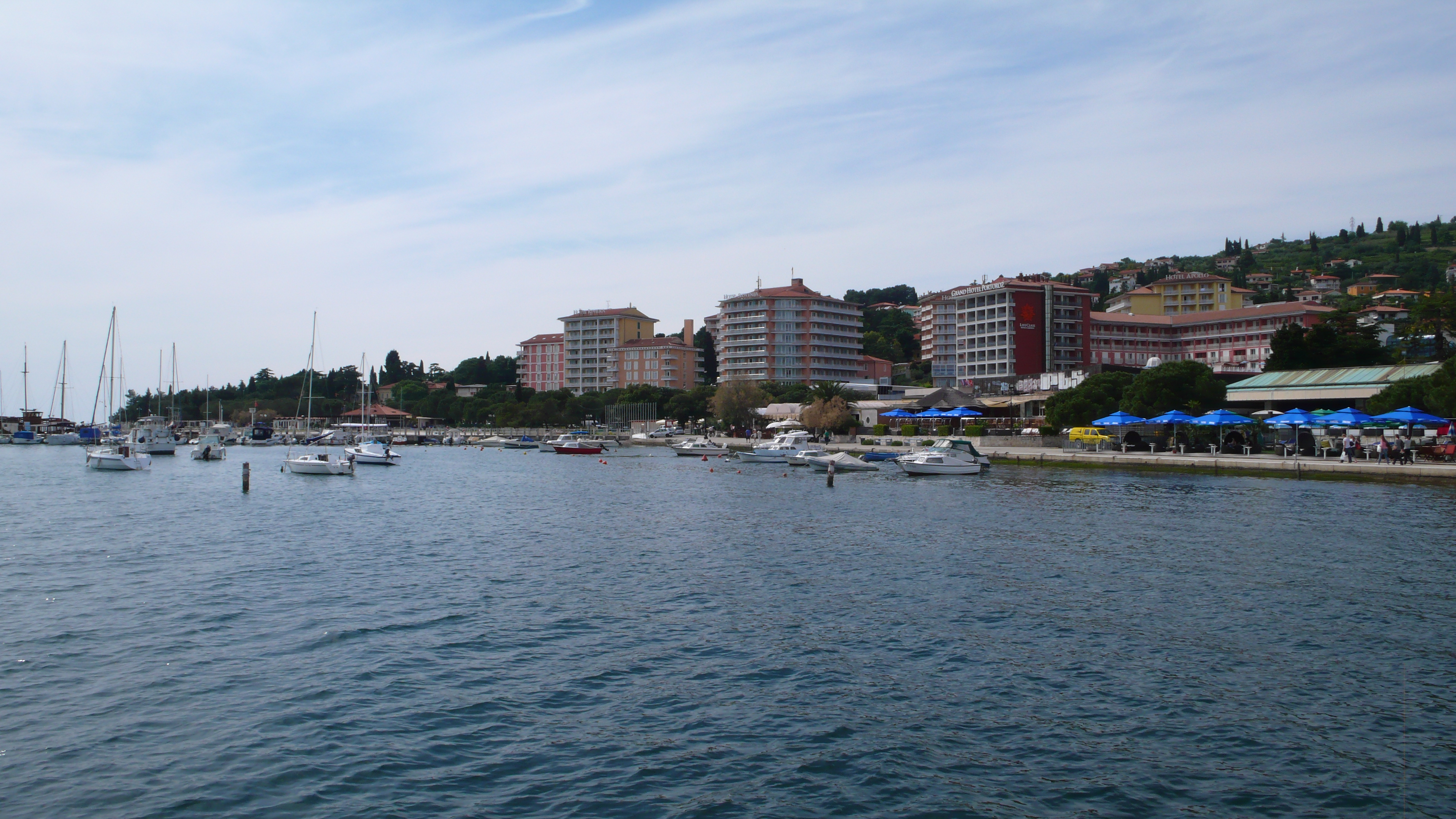 Portorož, Slowenien